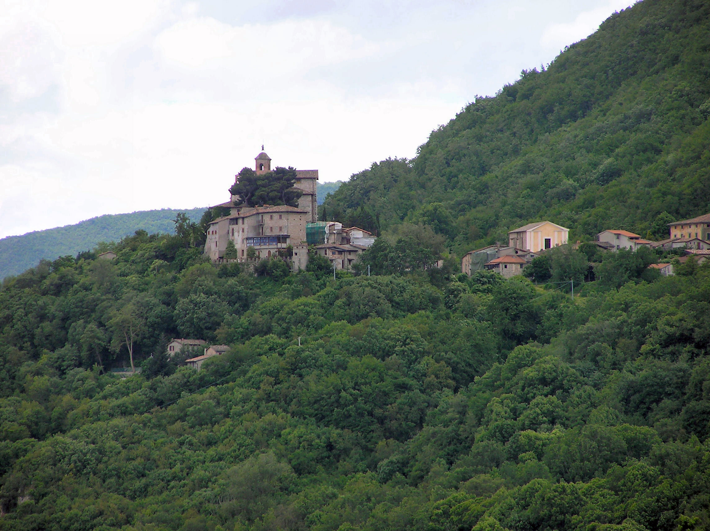 Greccio, village seen from convent